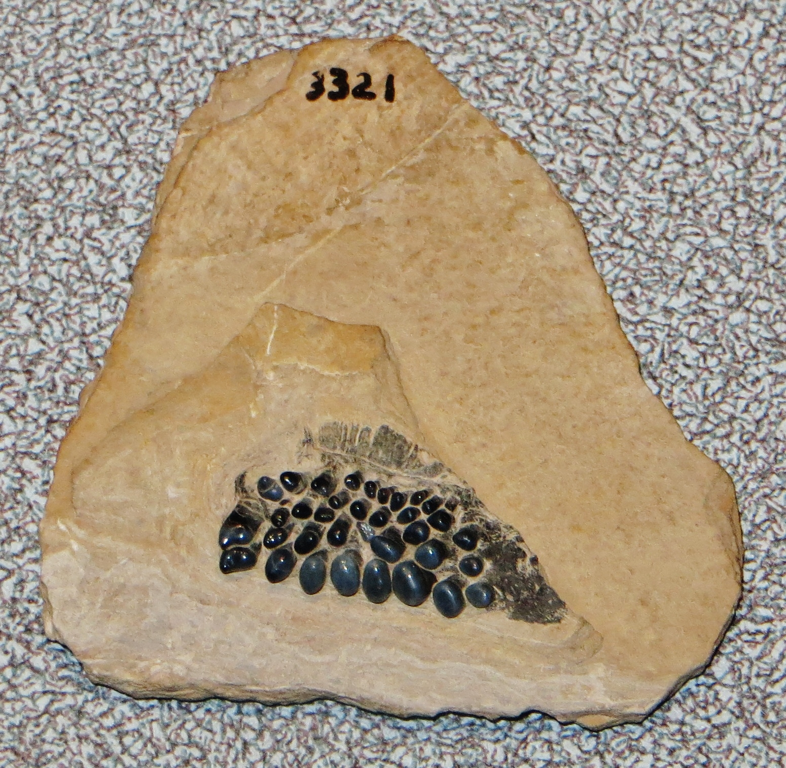 Fossil of Sargodon, an extinct fish- Took the picture at Museo di Scienze Naturali, Bergamo